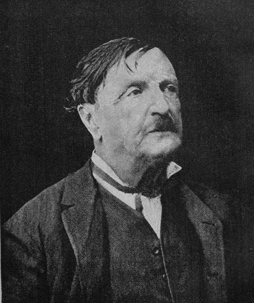 Portrait Cesare Mattei